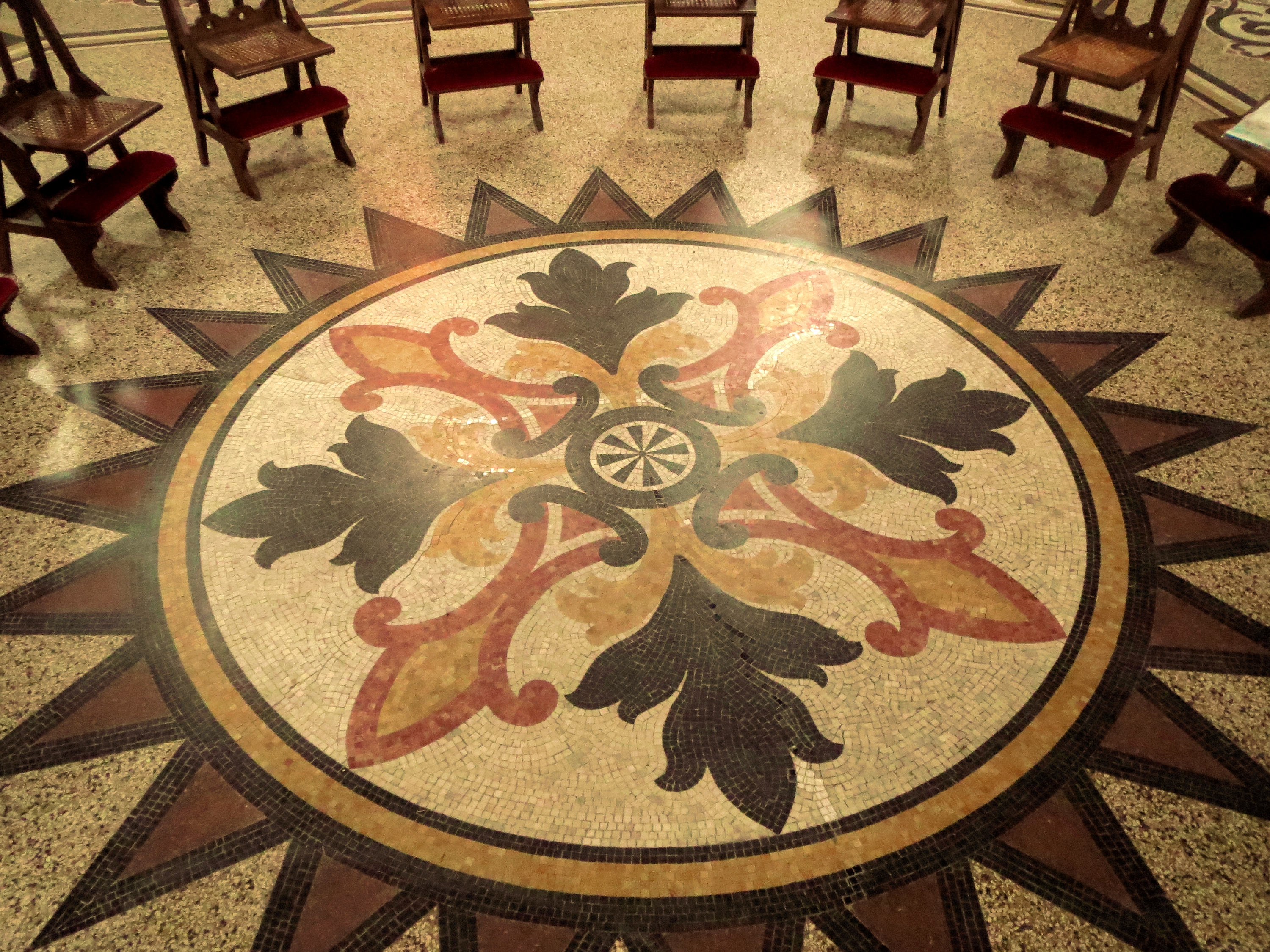 Oudenbosch Basilica vloermozaïk priesterkoor